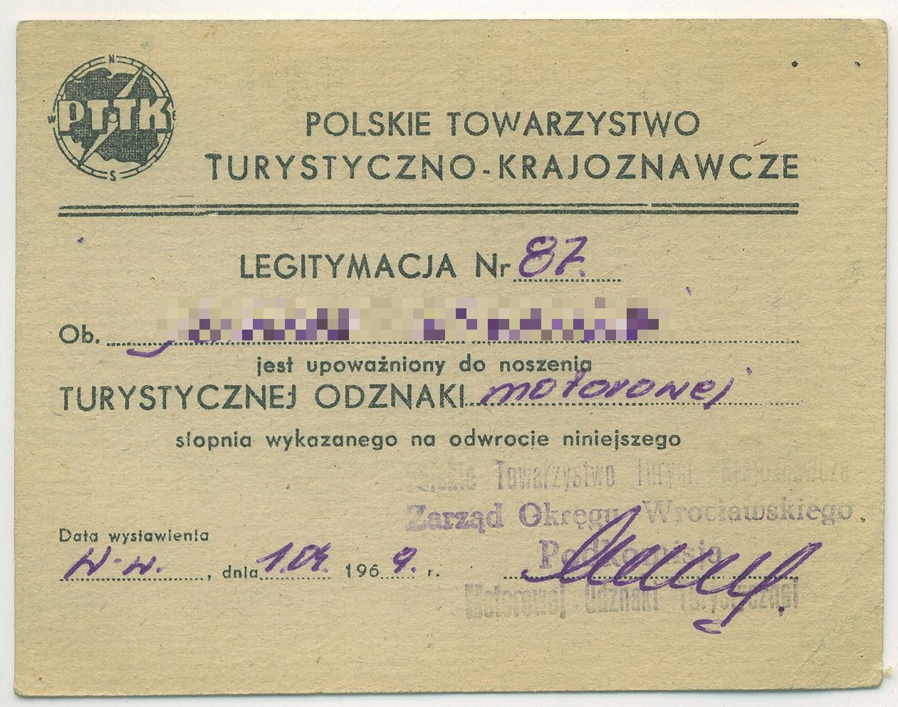 Legitymacja turystycznej odznaki motorowej PTTK z r. 1969